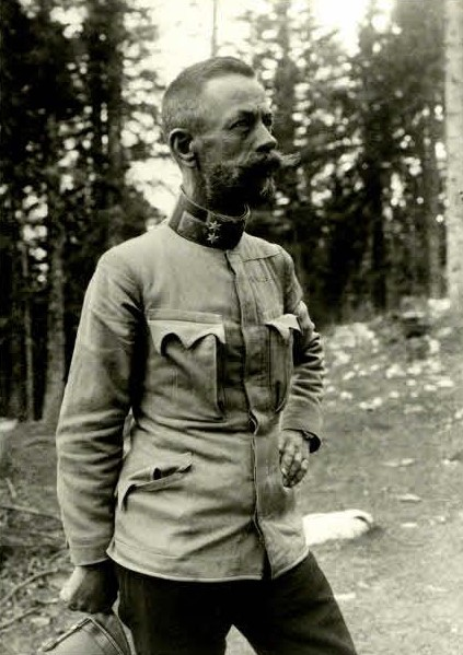 Feldmarschalleutnant Artur von Mecenseffy